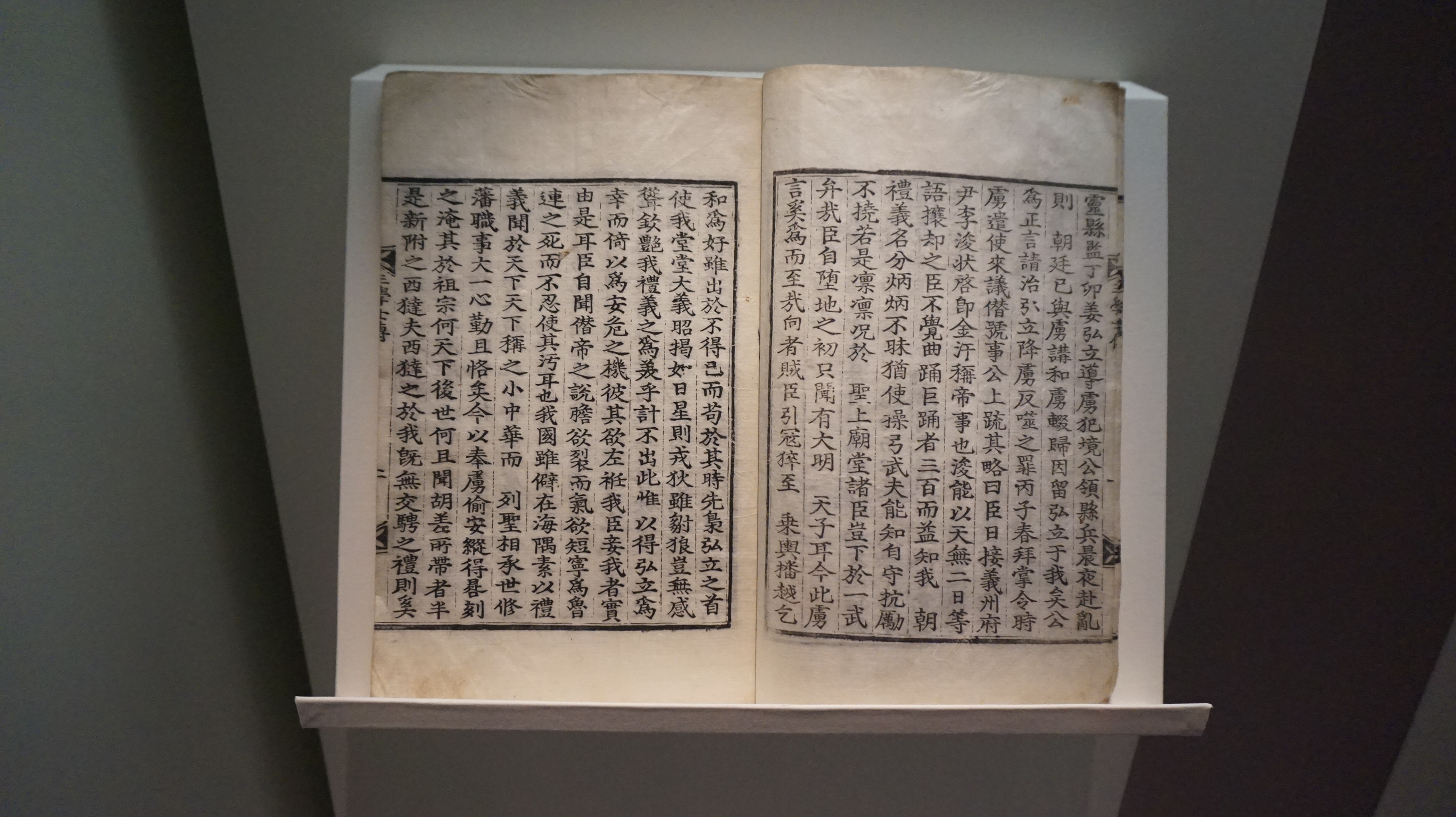 삼학사전 (1)